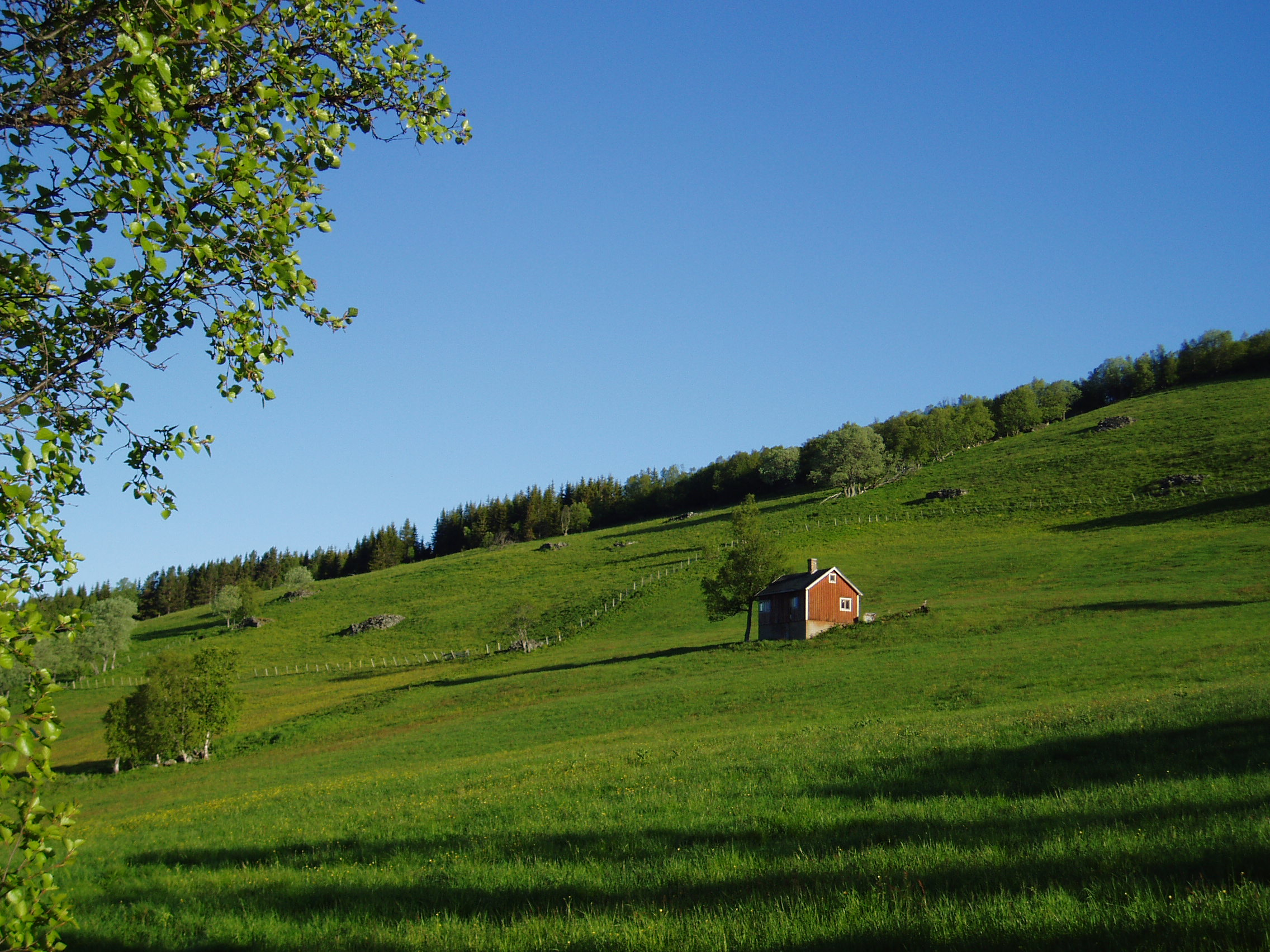 Et jorde på Dale i Kvæfjord med rydningsrøyser og et bolighus med enkel standard.